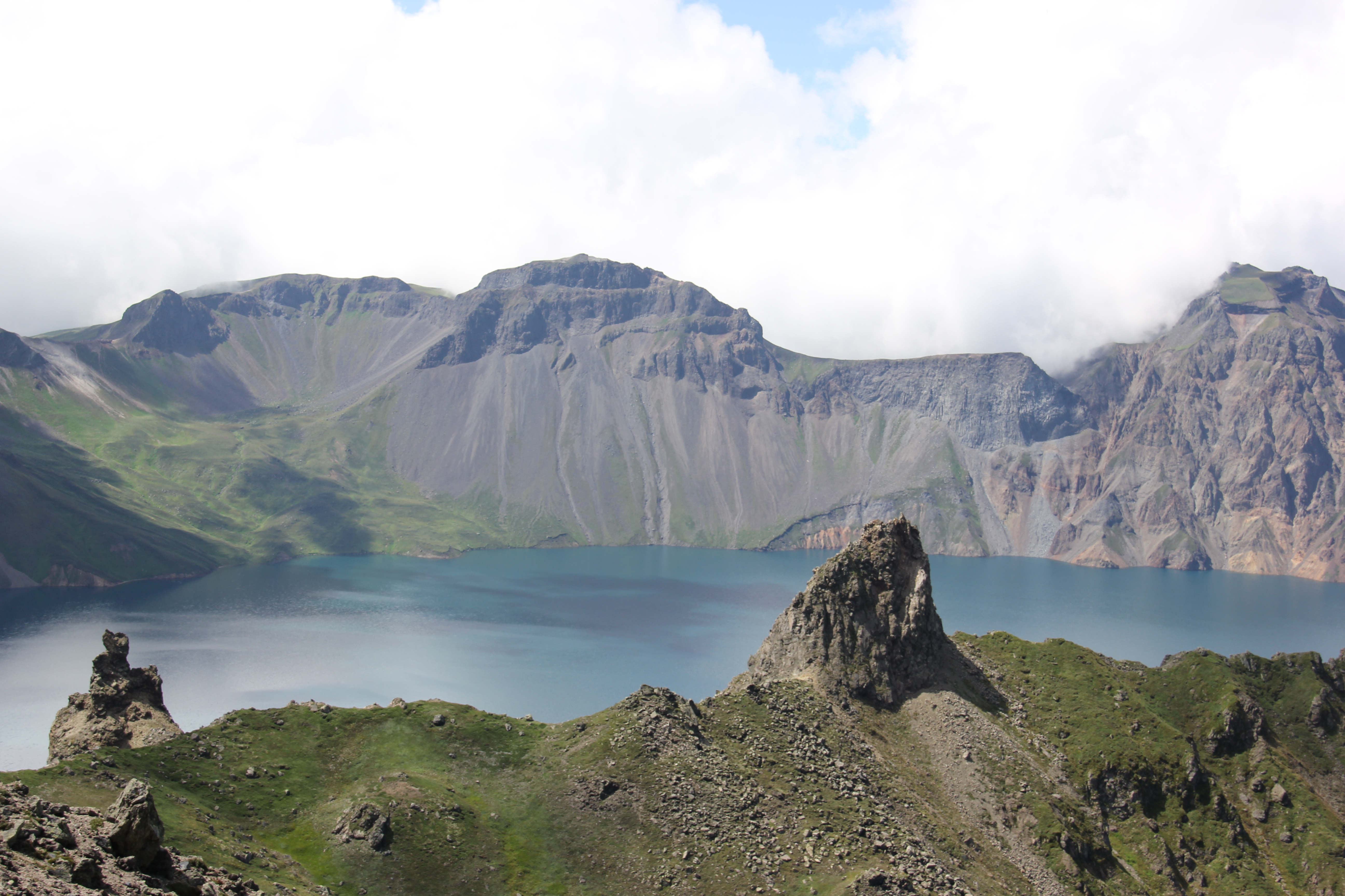 Mt. Paekdu